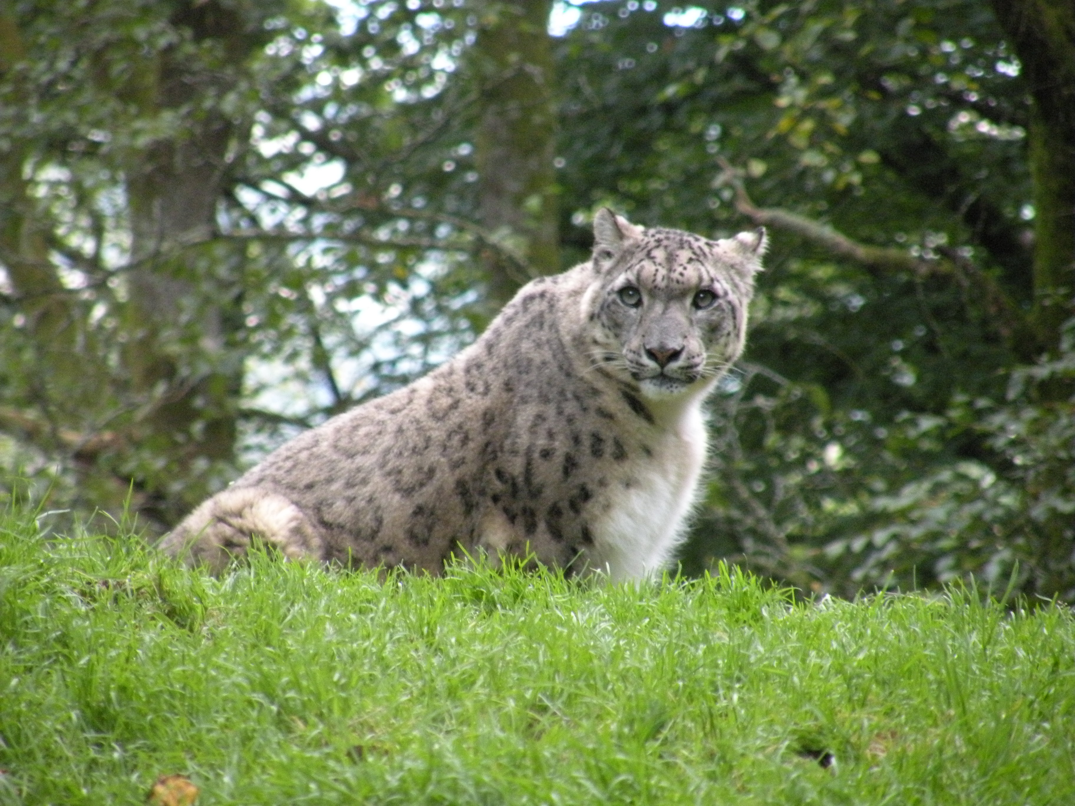 Zoo de Jurques - Once